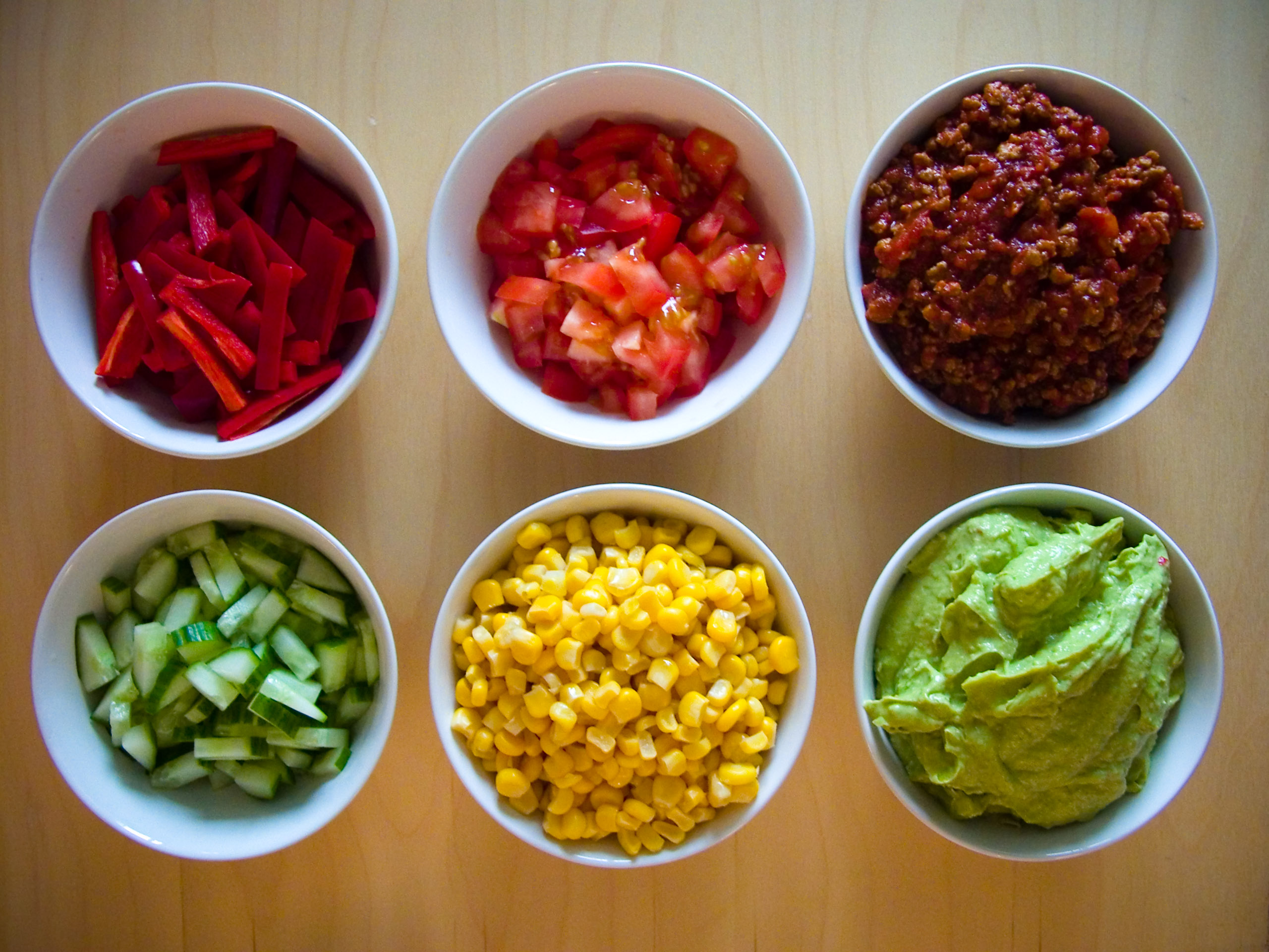 yum